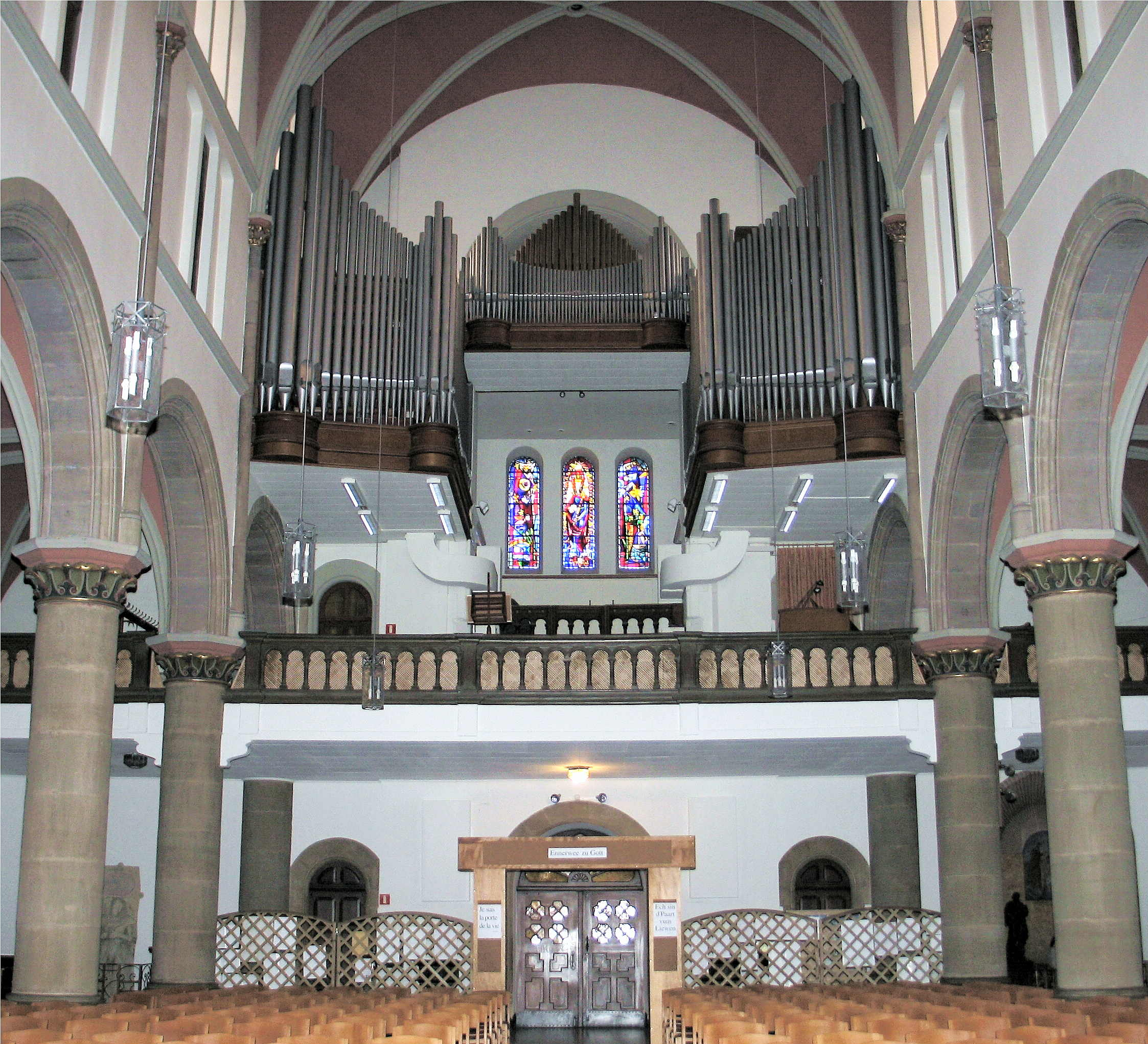 Duxall an Uergel an der Kierch zu Beetebuerg